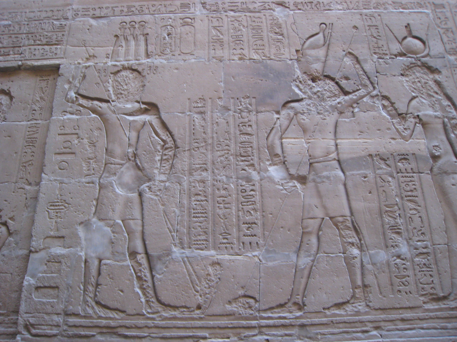 poor wee hippo!